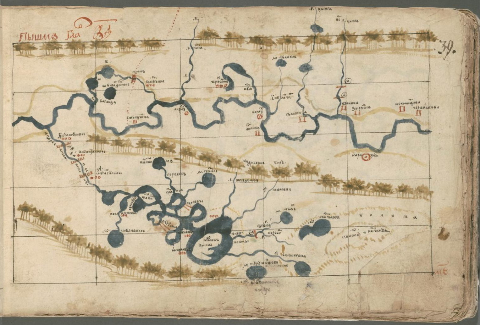 Пышма. Лист из "Хорографической книги" С. Ремезова.